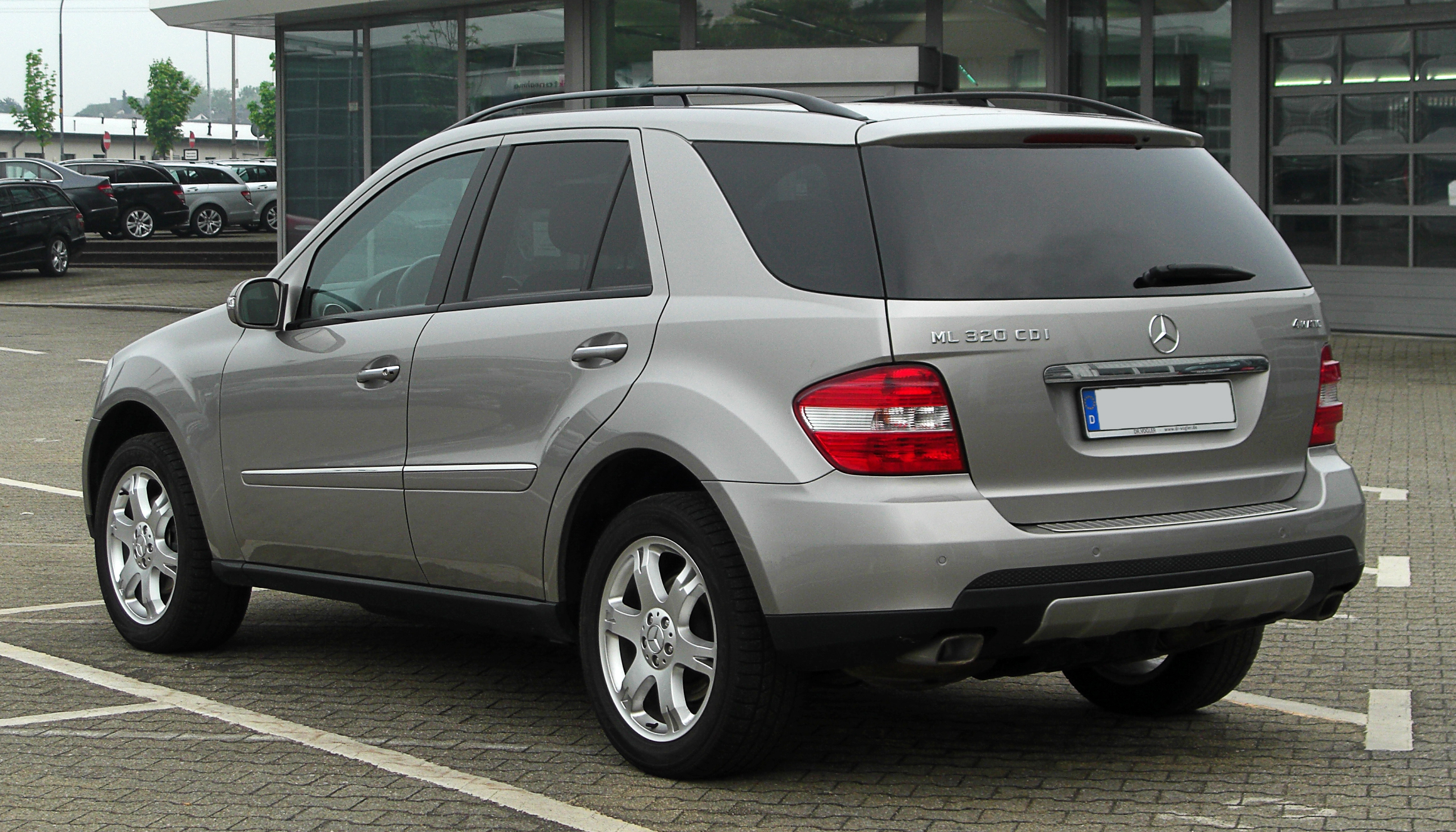 Mercedes-Benz ML 320 CDI 4MATIC (W 164)